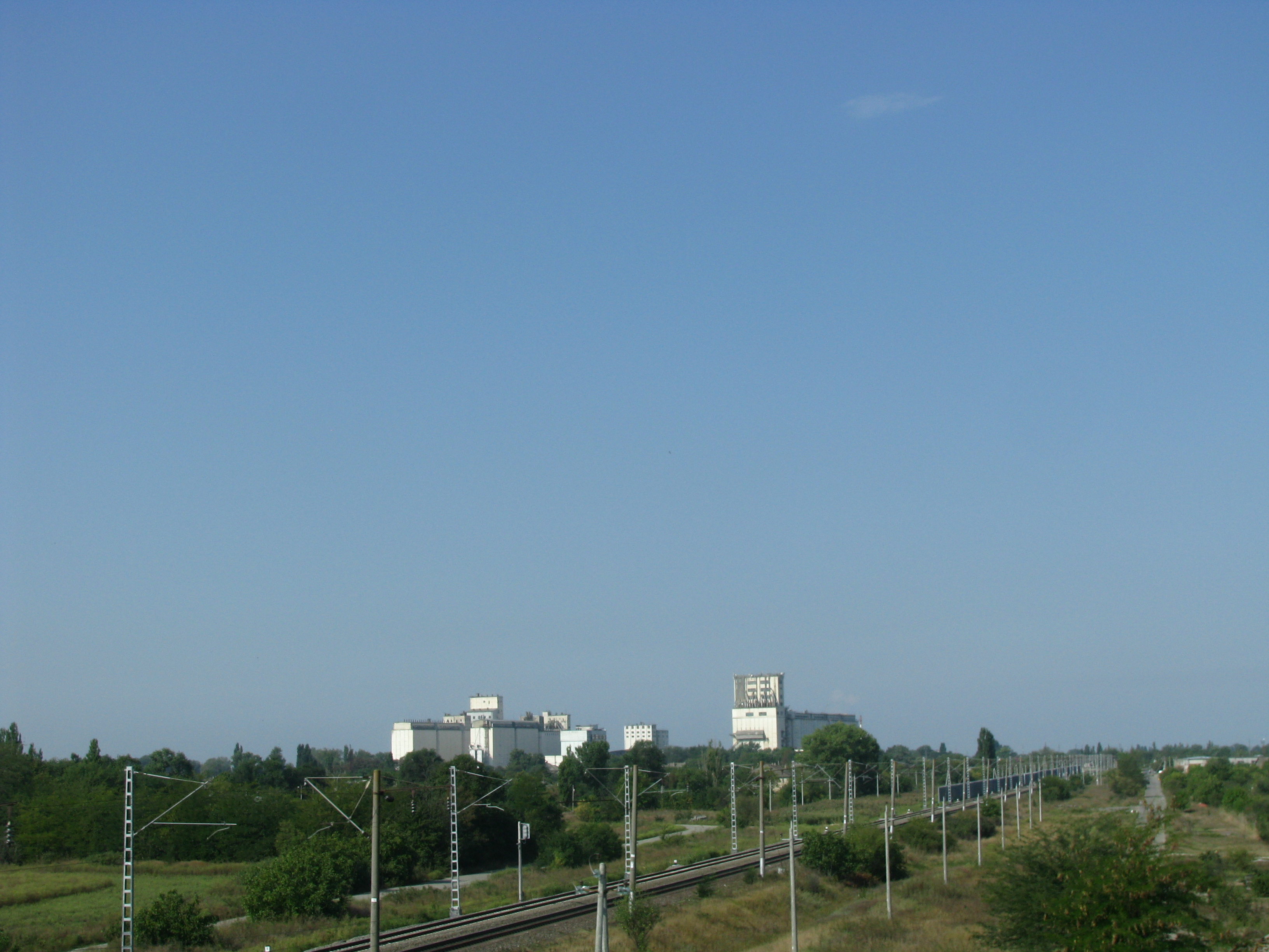 Элеватор в Полтавской